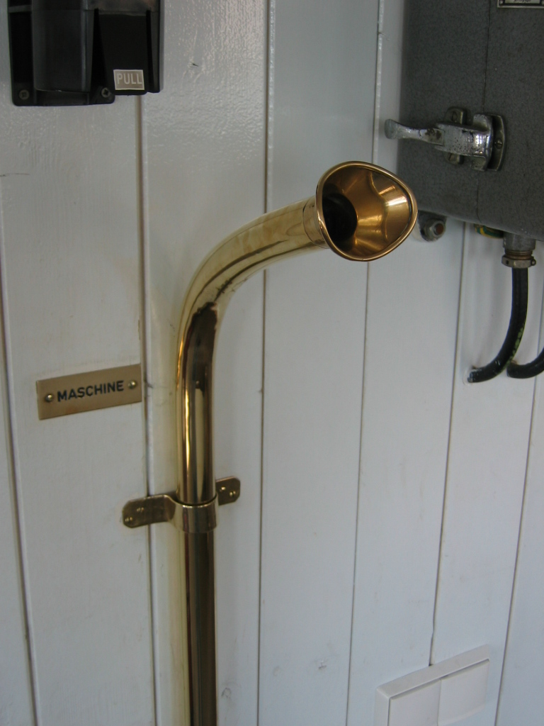 Rura głosowa służąca do komunikacji mostku kapitańskiego z maszynownią - parowiec Stettin - Hamburg